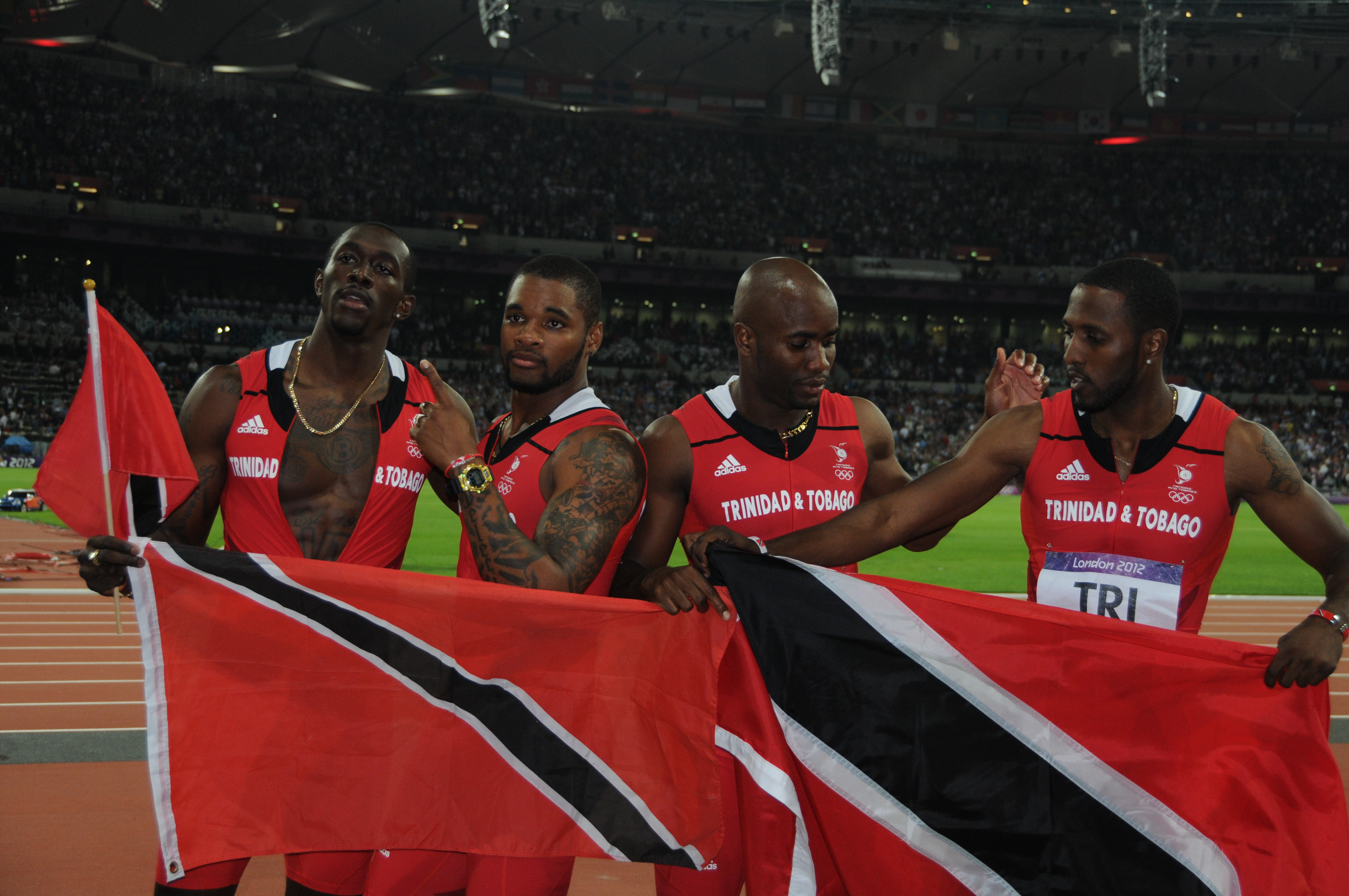 Equipe du relais 4x100 de Trinité-Tobago